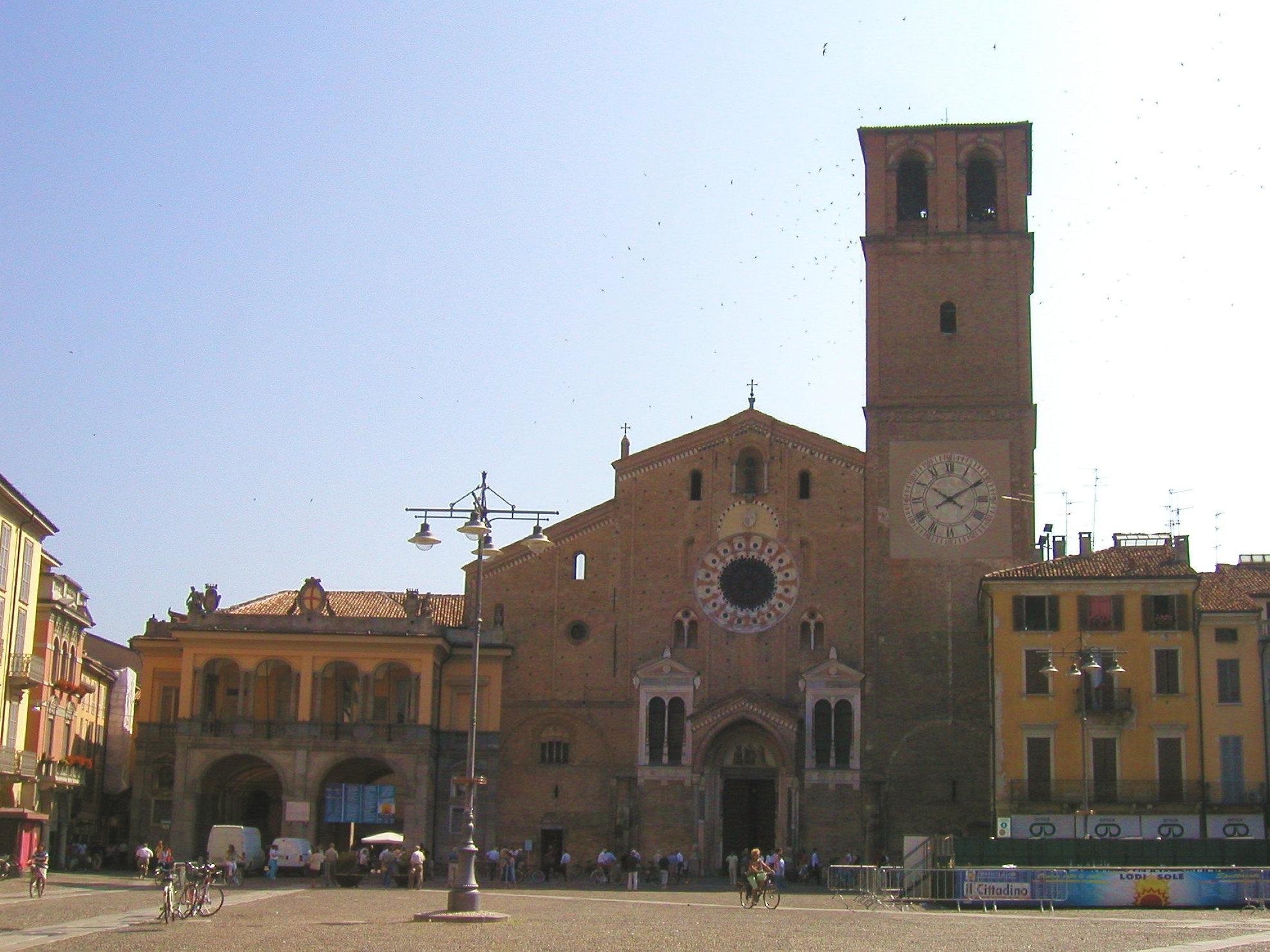 Lodi, Piazza della Vittoria